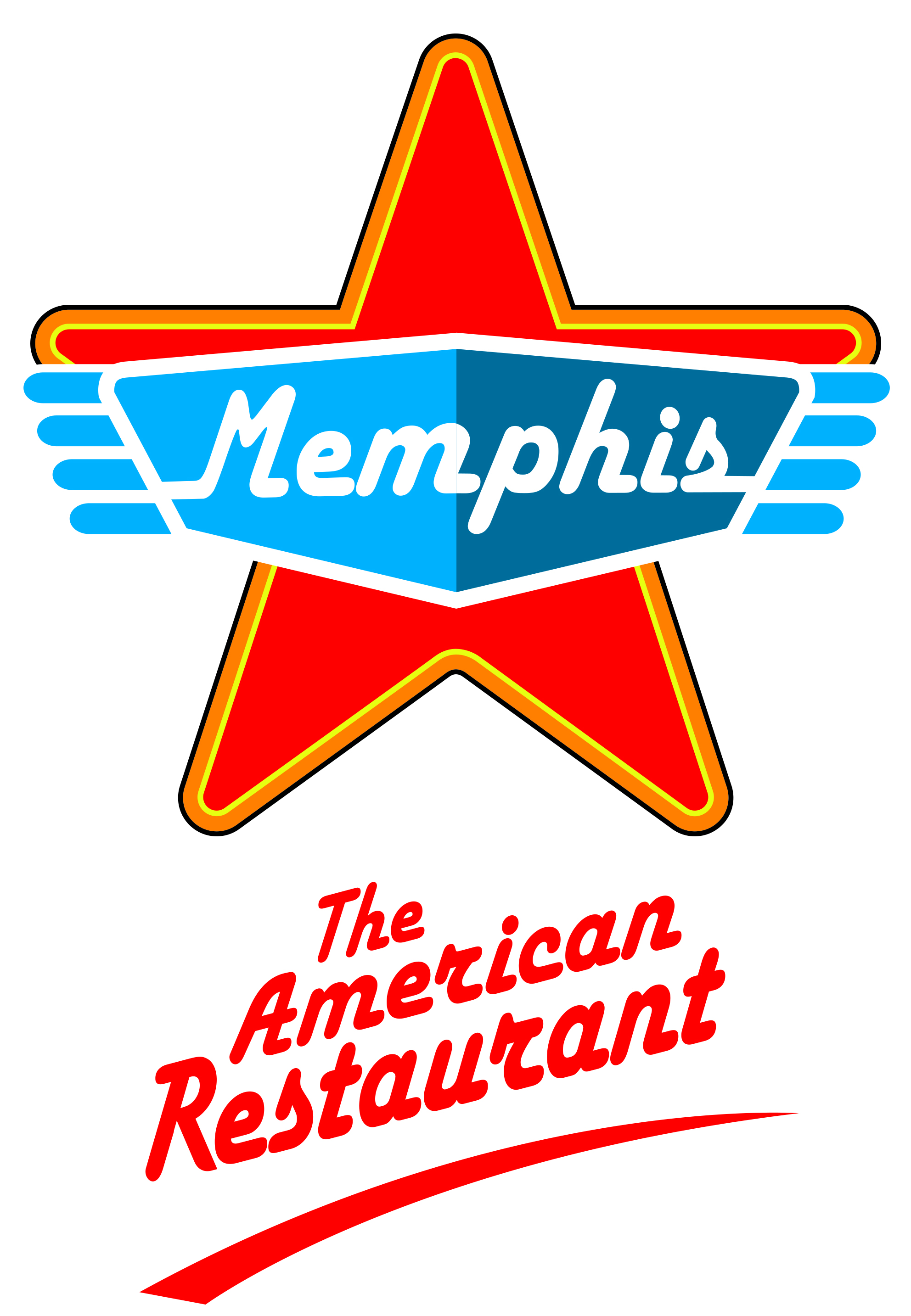 LogoMC 2017